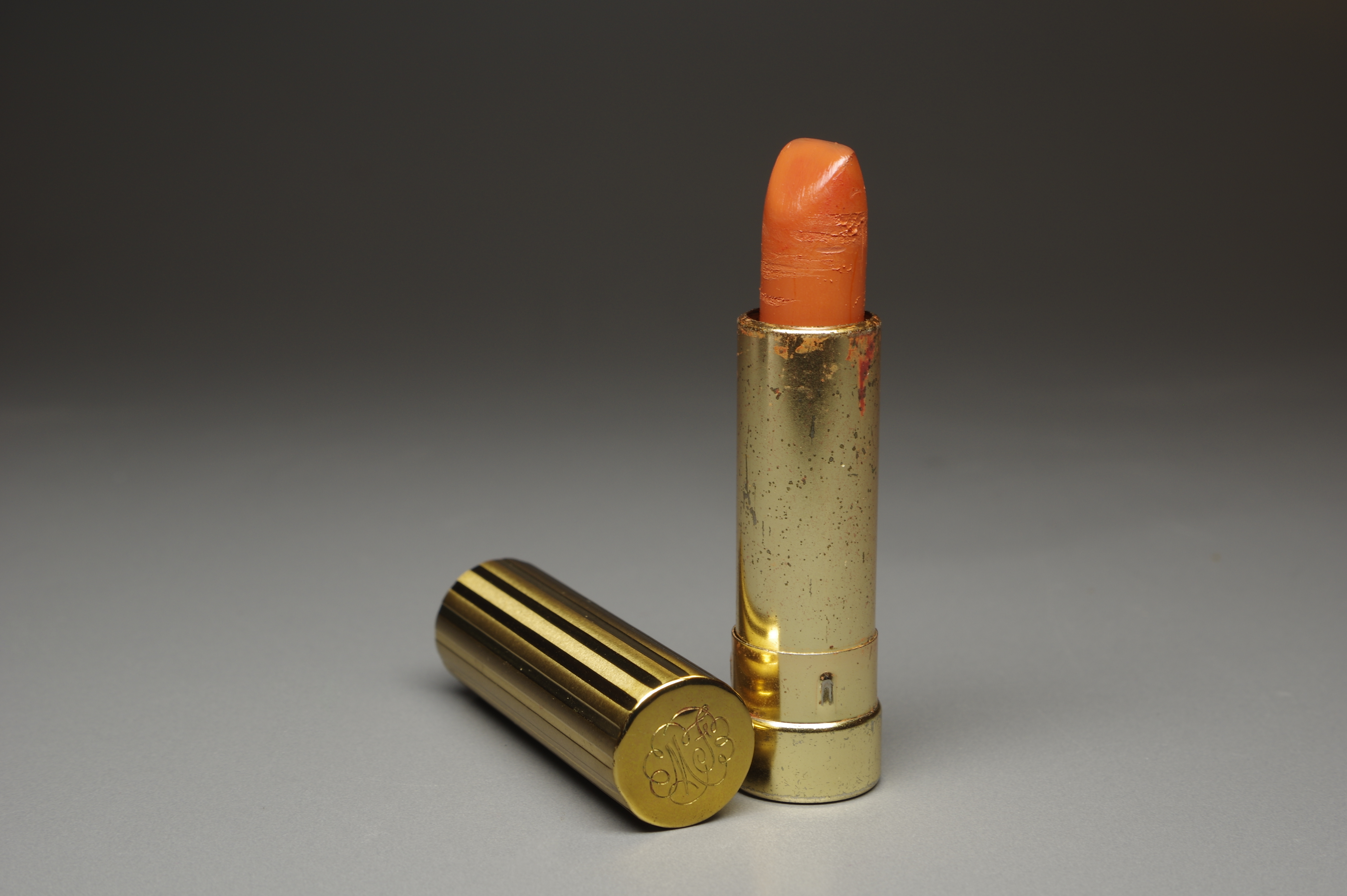 Max Faxtor Lippenstift, Nr. 93 Cappuccino Royale